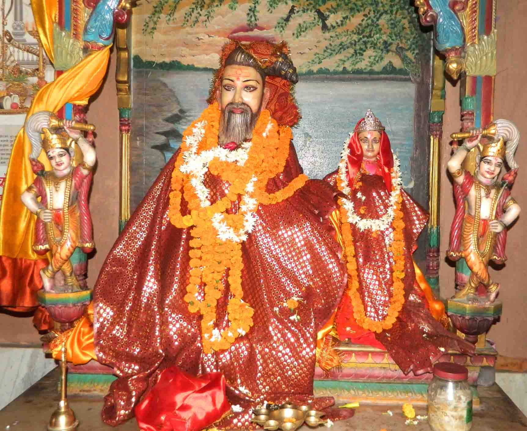 Maharshi Bhrigu